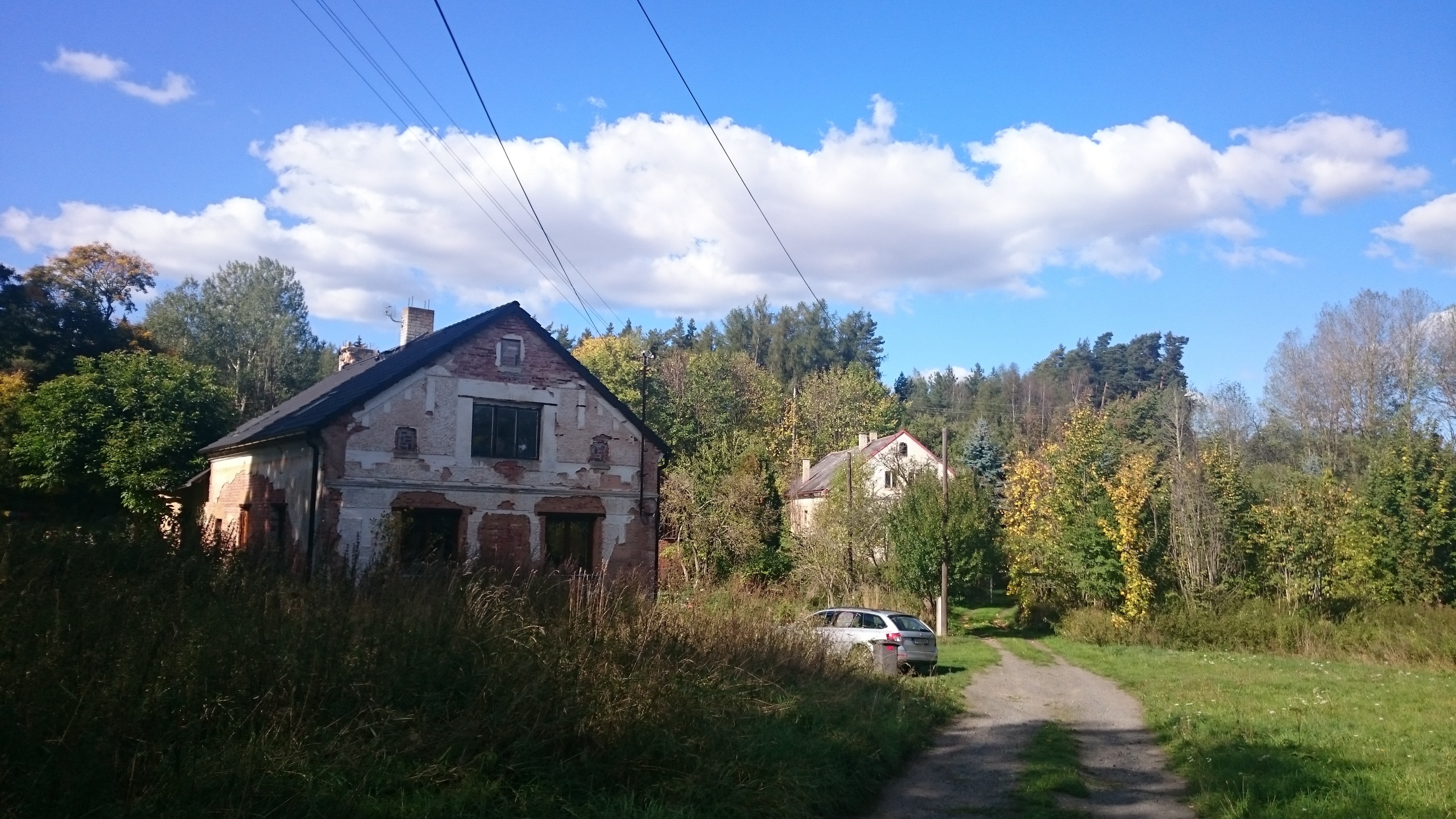 Domy v Potoce. Okres Plzeň-sever, Česká republika.